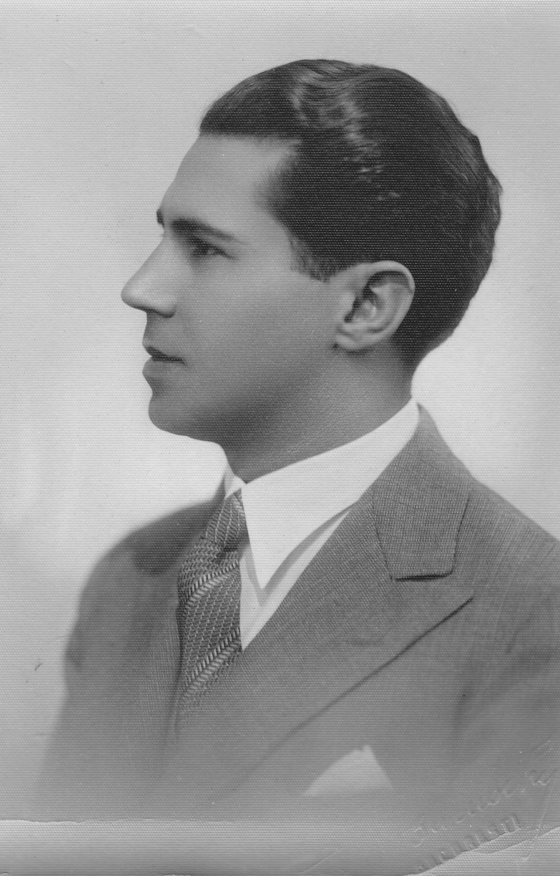 צדוק שלוש בצעירותו